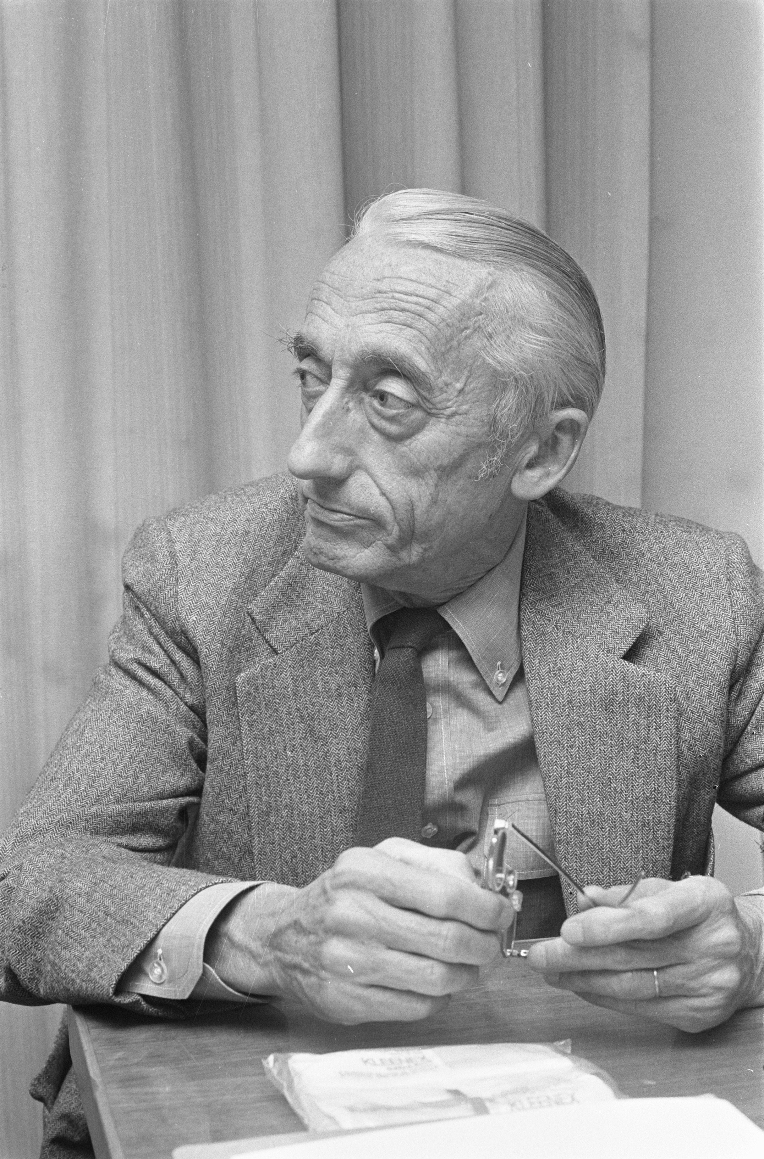 Le commandant Cousteau en 1972 à La Haye pour une conférence. Photo libre de droits. Archives des Pays-Bas. Anefo.